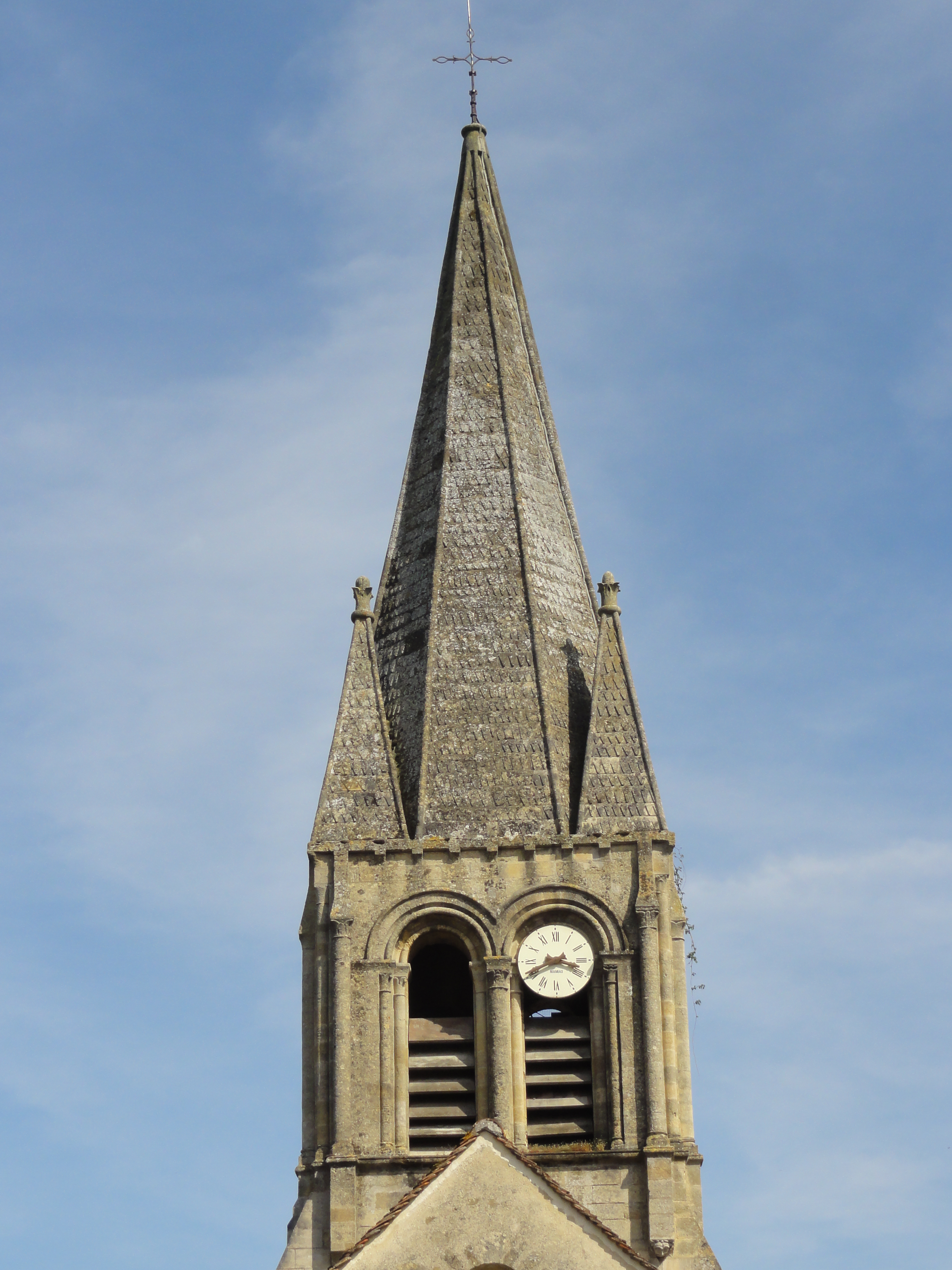 Église Saint-Germain-de-Paris de Hardricourt - voir titre.